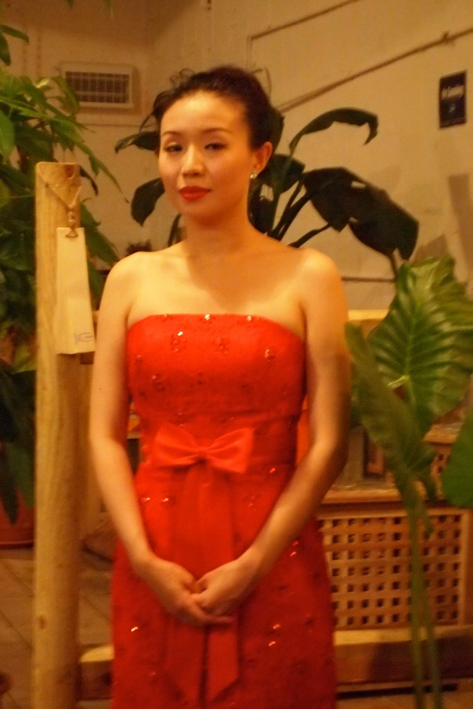 Ruhan Jia @ Ran Tea House - 6/22/12 - 161